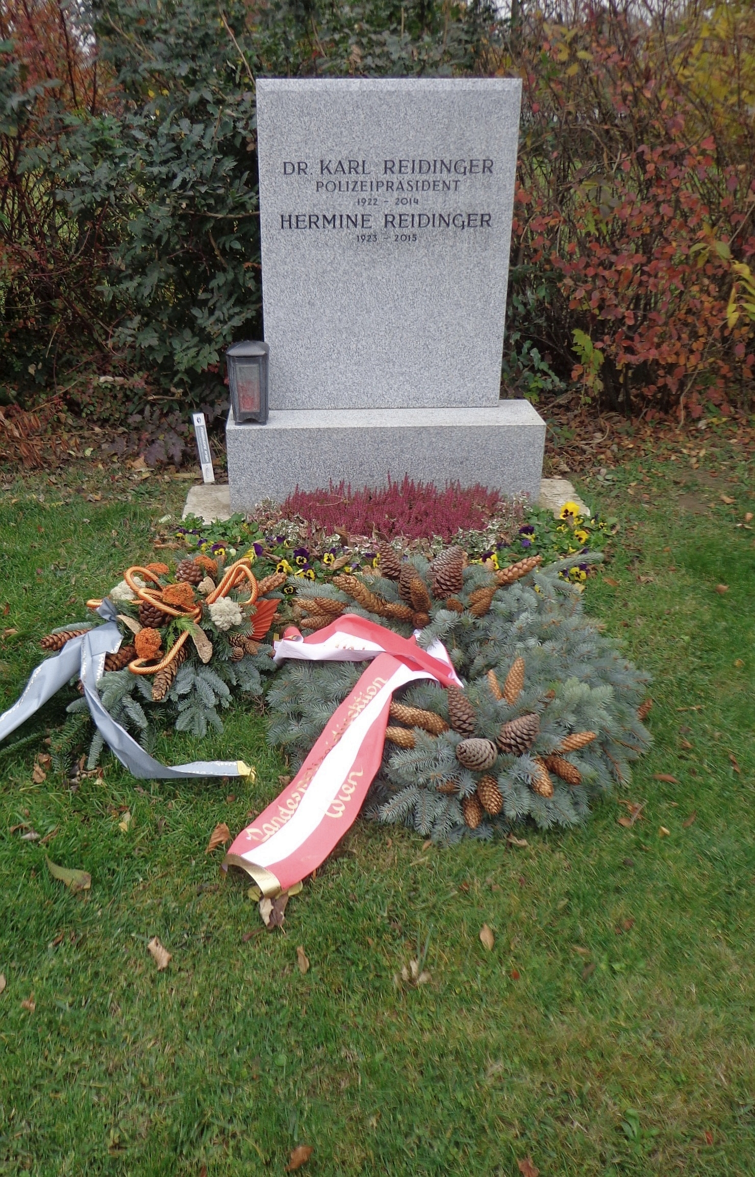 Wiener Zentralfriedhof - Gruppe 15 G, Ehrengrab von Karl Reidinger